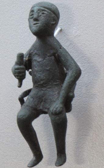 Tamada en bronze, pièce retrouvée à Vani. VIIe s av J.-C.